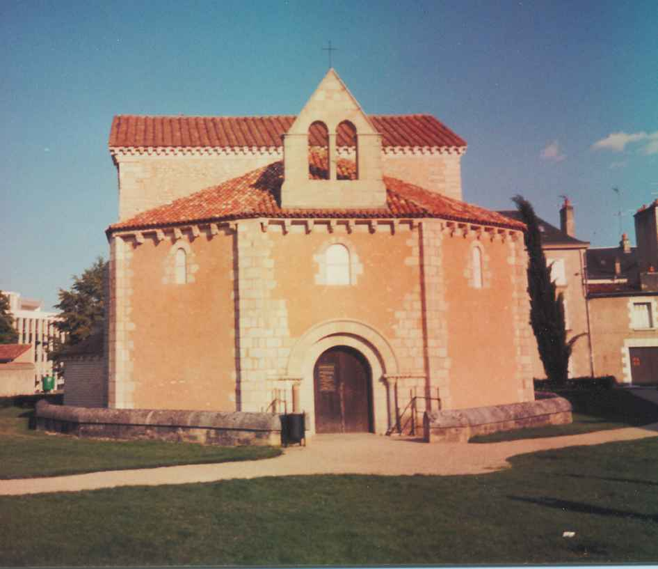 Date : fr:5 août 2004, vers 20 h 00 Source : photo personnelle d'archeos Description : FaÃ§ade du Baptistère Saint-Jean à Poitiers Licence